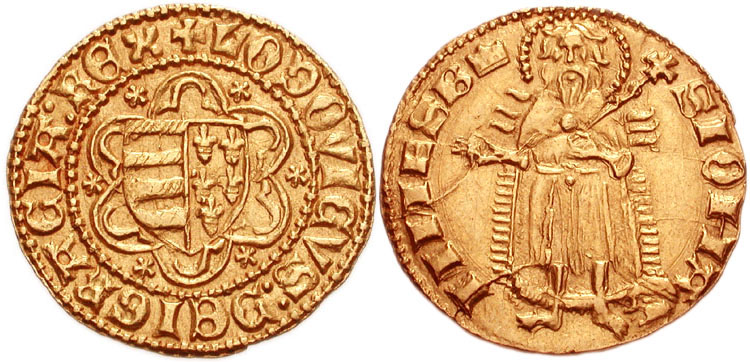 Nagy Lajos király aranyforintja Hungary Lajos I (Nagy Lajos) aka Ludwig I. (1342-1382). AV Florint or Gulden (21mm, 3.55 g, 4h). Buda or Pécs mint; Jacob Saracenus, mintmaster. Struck 1353-1357. Royal coat-of-arms within hexalobe, stars in spandrels John the Baptist standing, raising hand in benediction and holding cross- tipped sceptre; at feet, head left (mint mark) to left. Pohl B 2; Huszár 513; Friedberg 4(3).